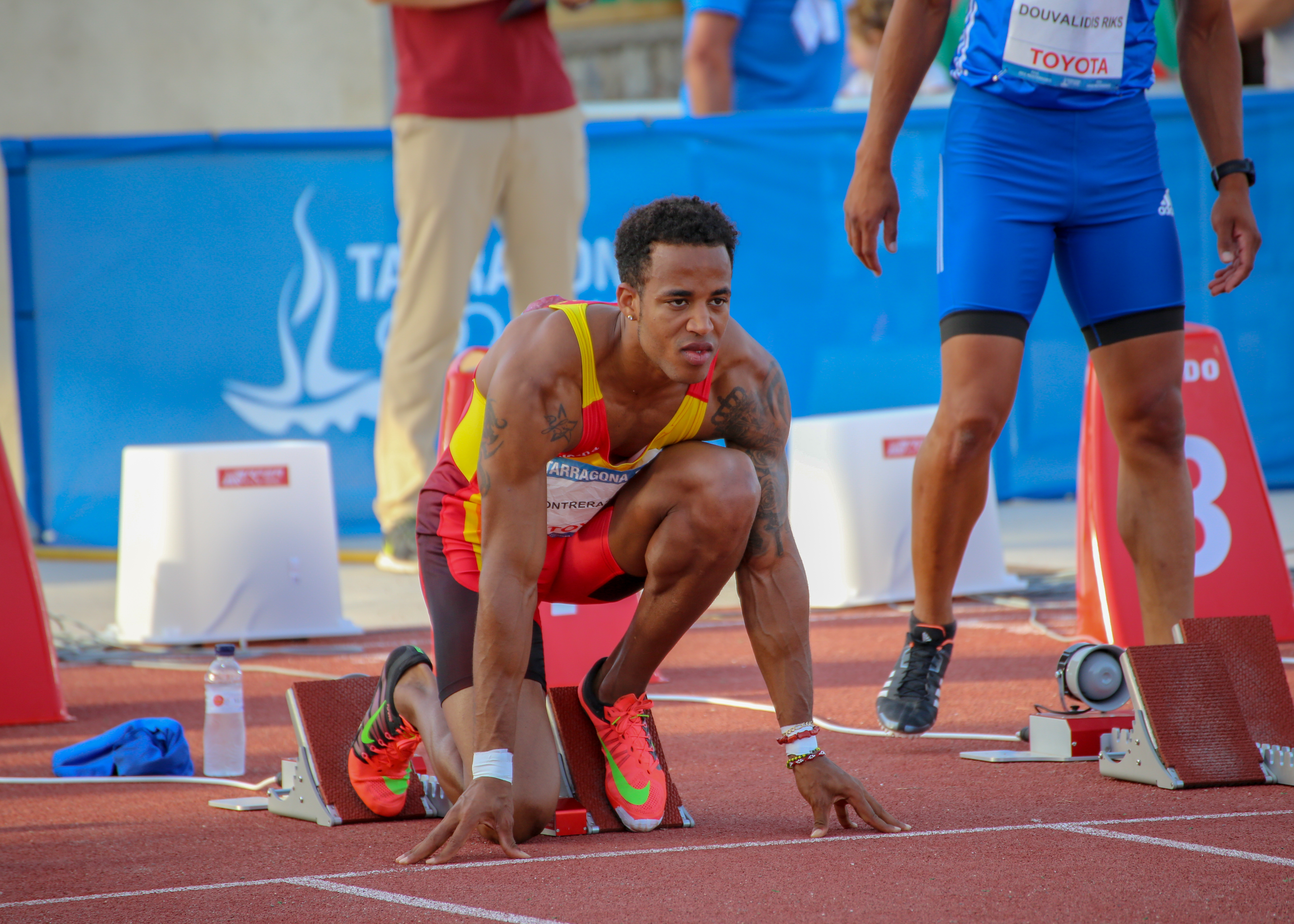 Yidiel Contreras en los 110 metros vallas de los Juegos del Mediterráneo 2018